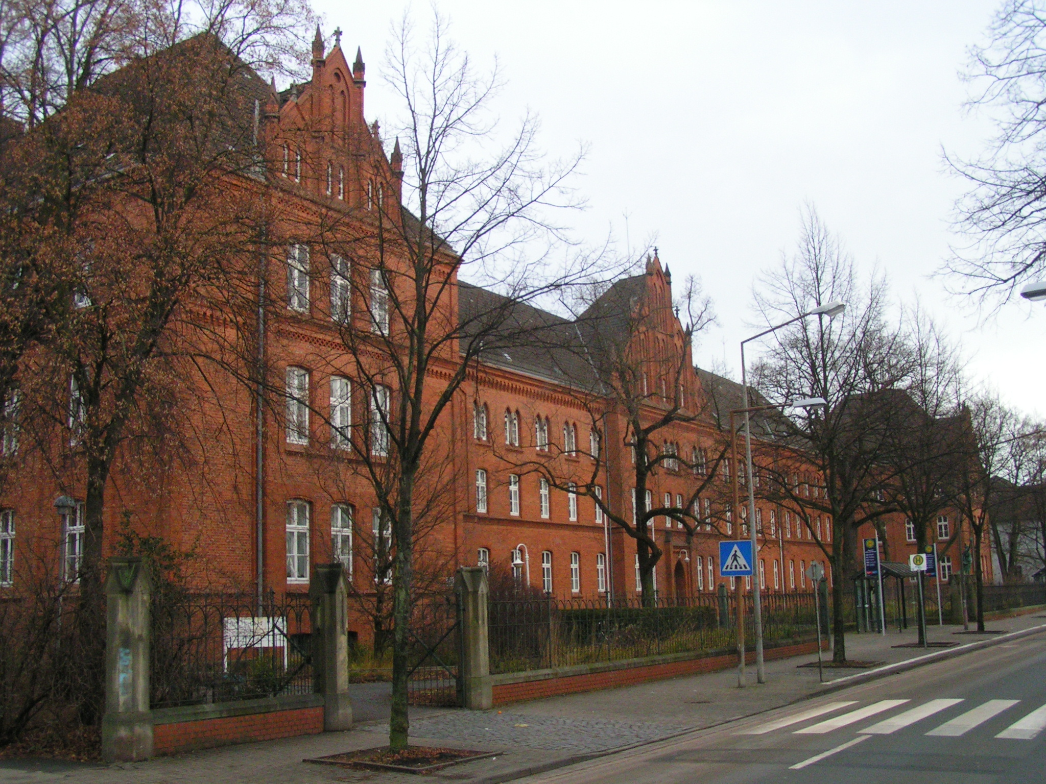 Hölty-Gymnasium in Wunstorf